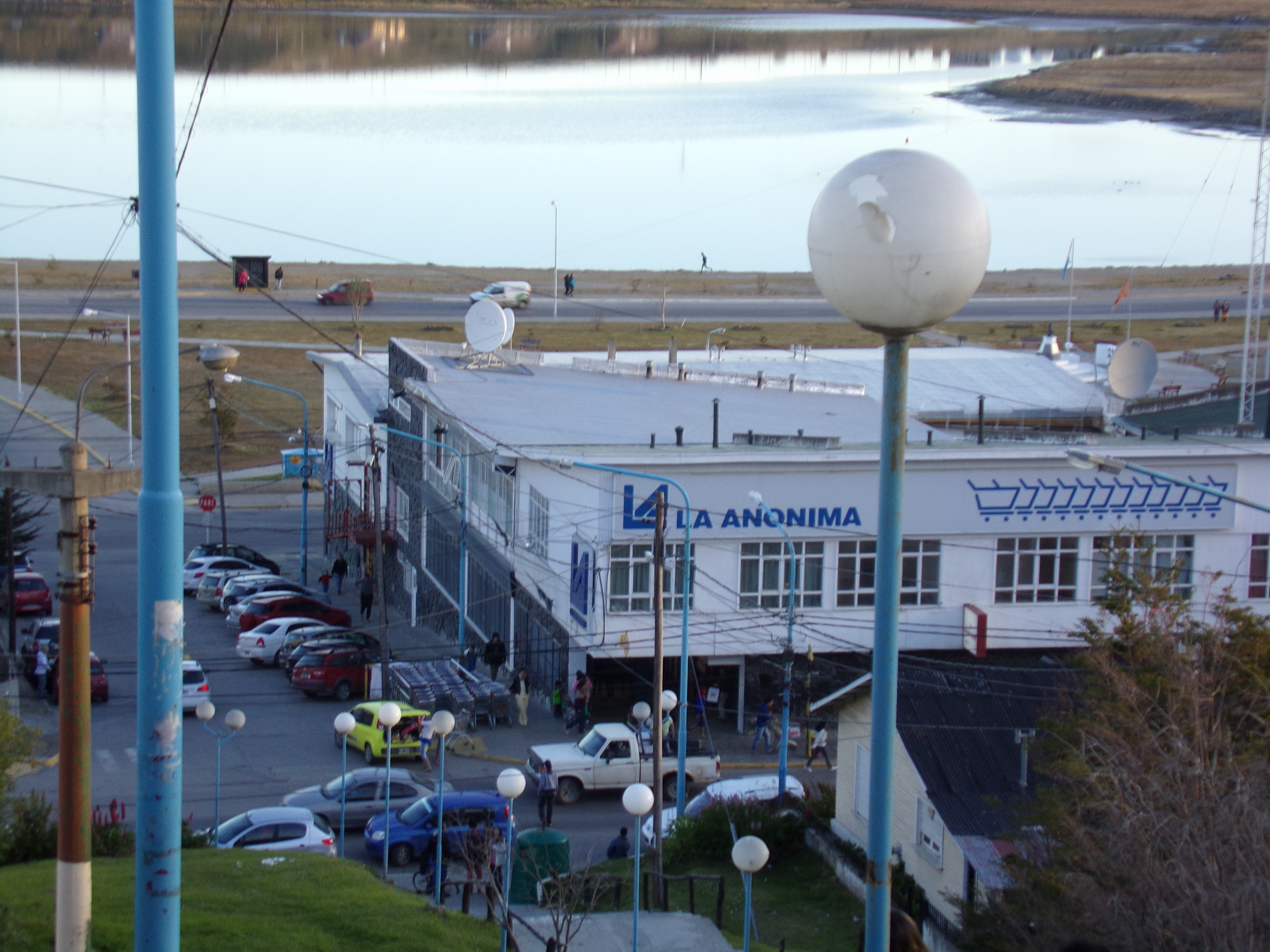 La Anonima Suc Ushuaia - Centro